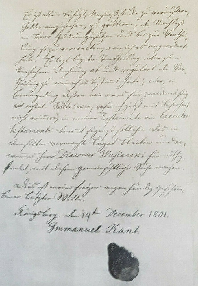 Die letzte Seite von Kants Testament. Es ist der erste Nachtrag vom 14. Dezember 1801 und setzt Wasianski als "Curator funeris und executor testamenti" ein und vermacht ihm 2000 Taler, desgleichen der Köchin Louise Nitzschin 2000 Gulden.